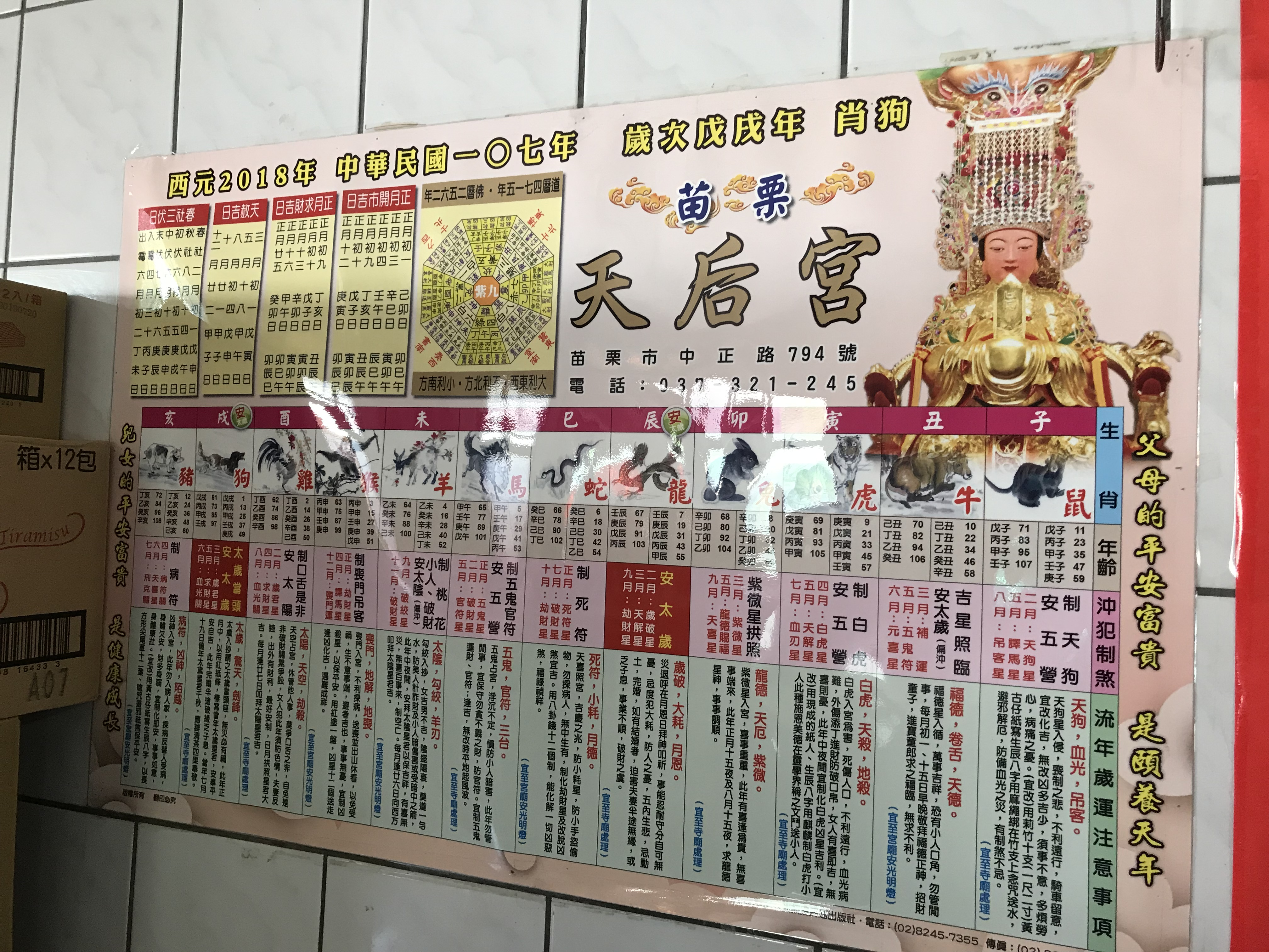 苗栗天后宮2018年太歲犯沖表